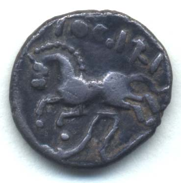 Monnaie gauloise, environs de Besançon, Denier Togirix en argent. Revers : Cheval galopant à gauche, bridé et sanglé, on distingue un reptile cornu sous le cheval. Au-dessus du cheval, on relève le pied centripète des lettres de la légende TOGIRI ou exceptionnellement TOGIRIX. Au pourtour, on distingue un grènetis périphérique Collection Joël Grillon.